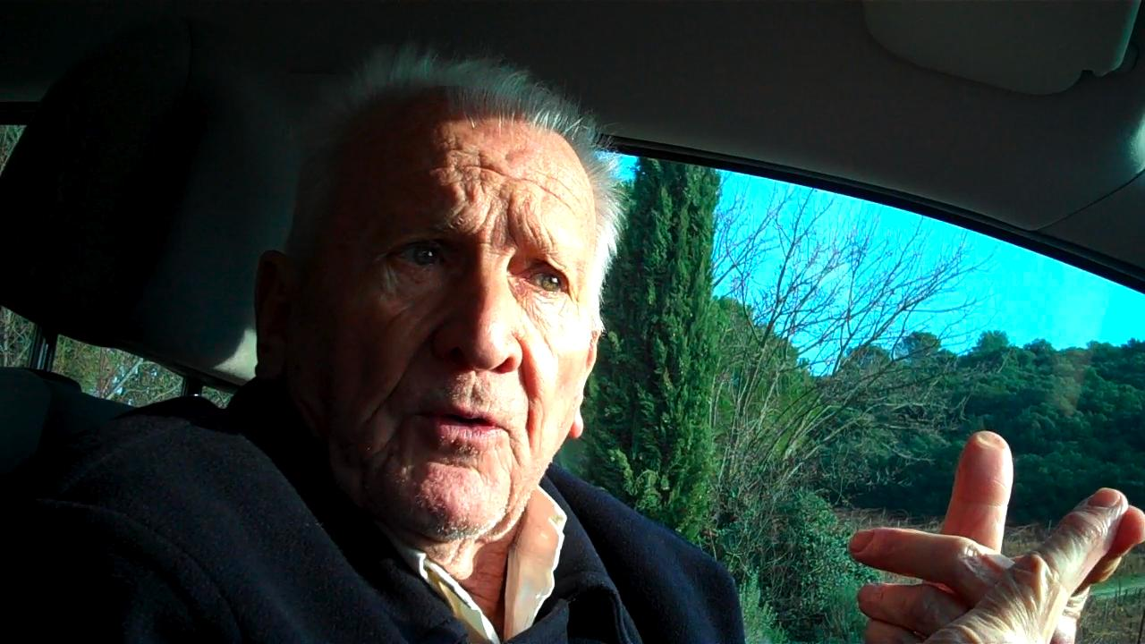 Aimé Guibert, propriétaire du mas de Daumas-Gassac